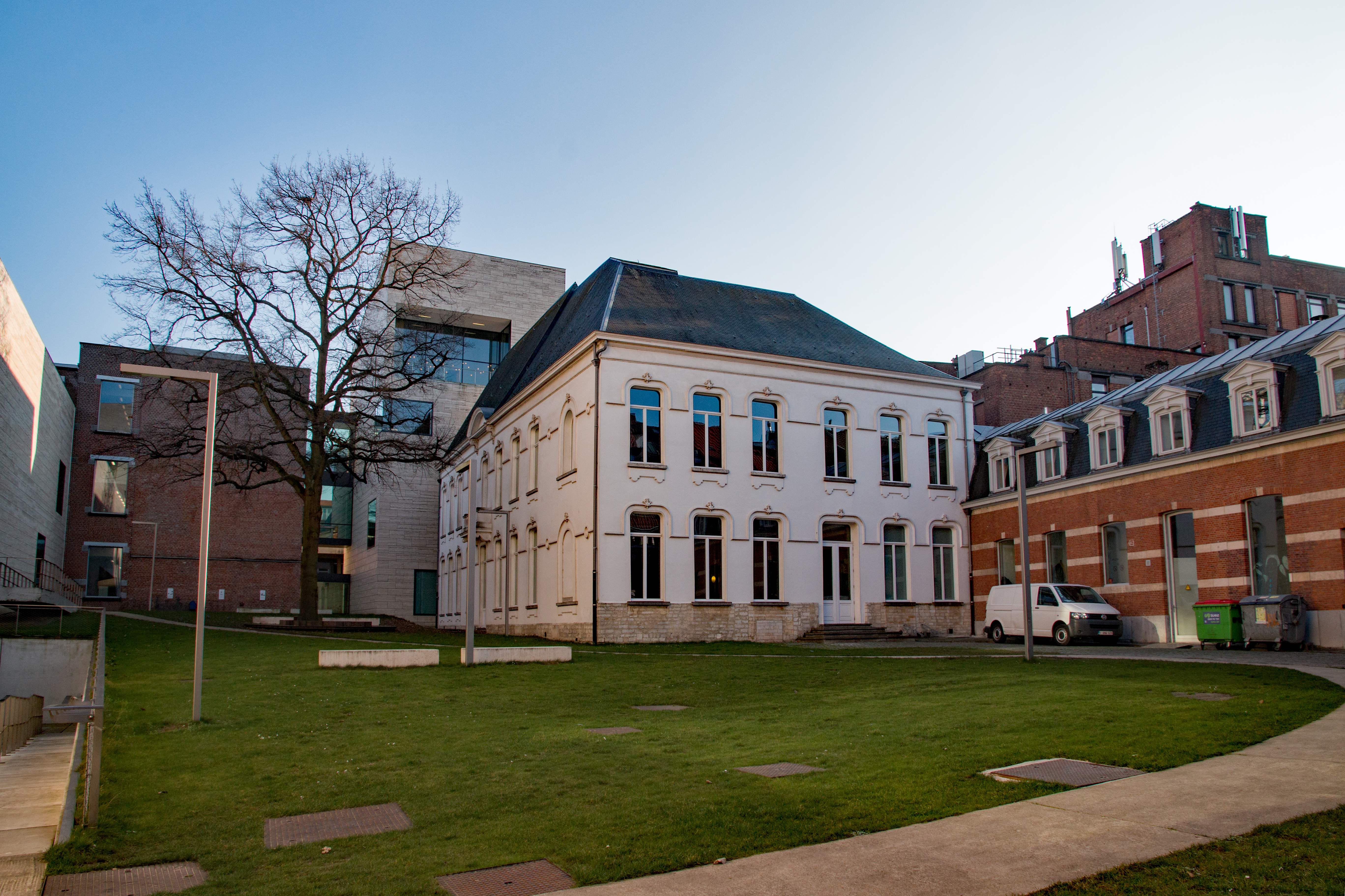 Leuven College van Savoye en huis Vander Kelen-Mertens